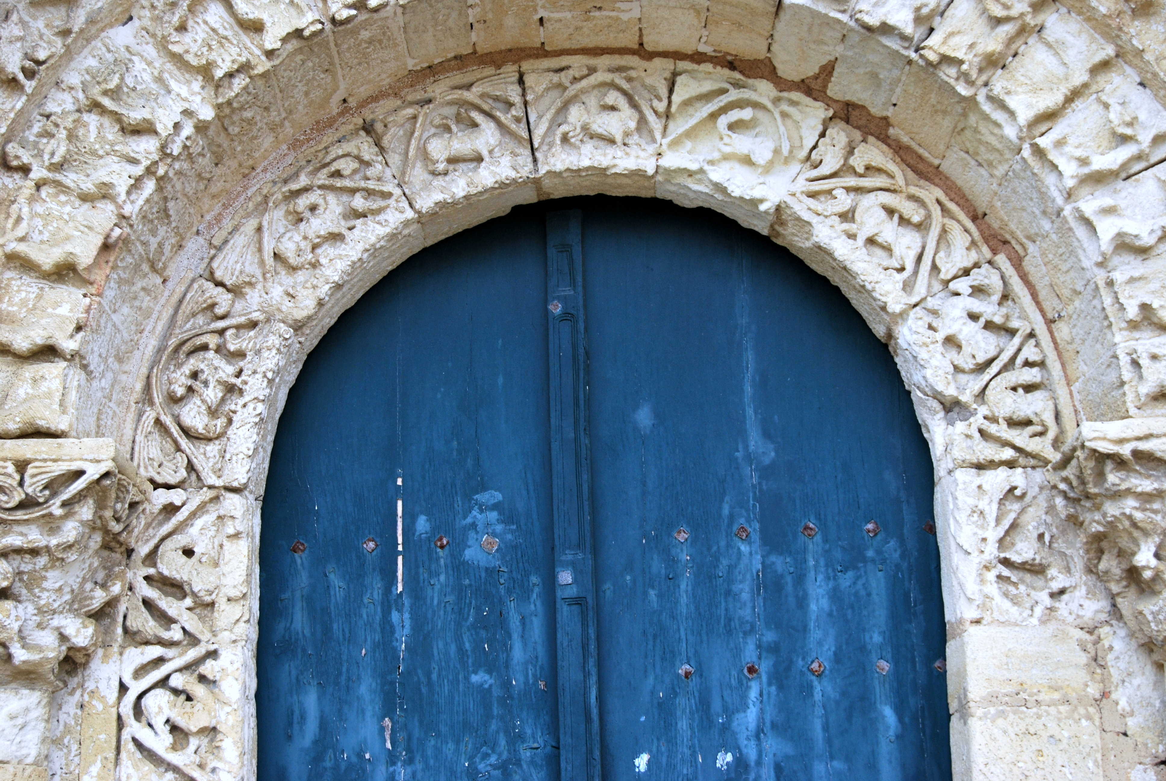 Haux église St Martin